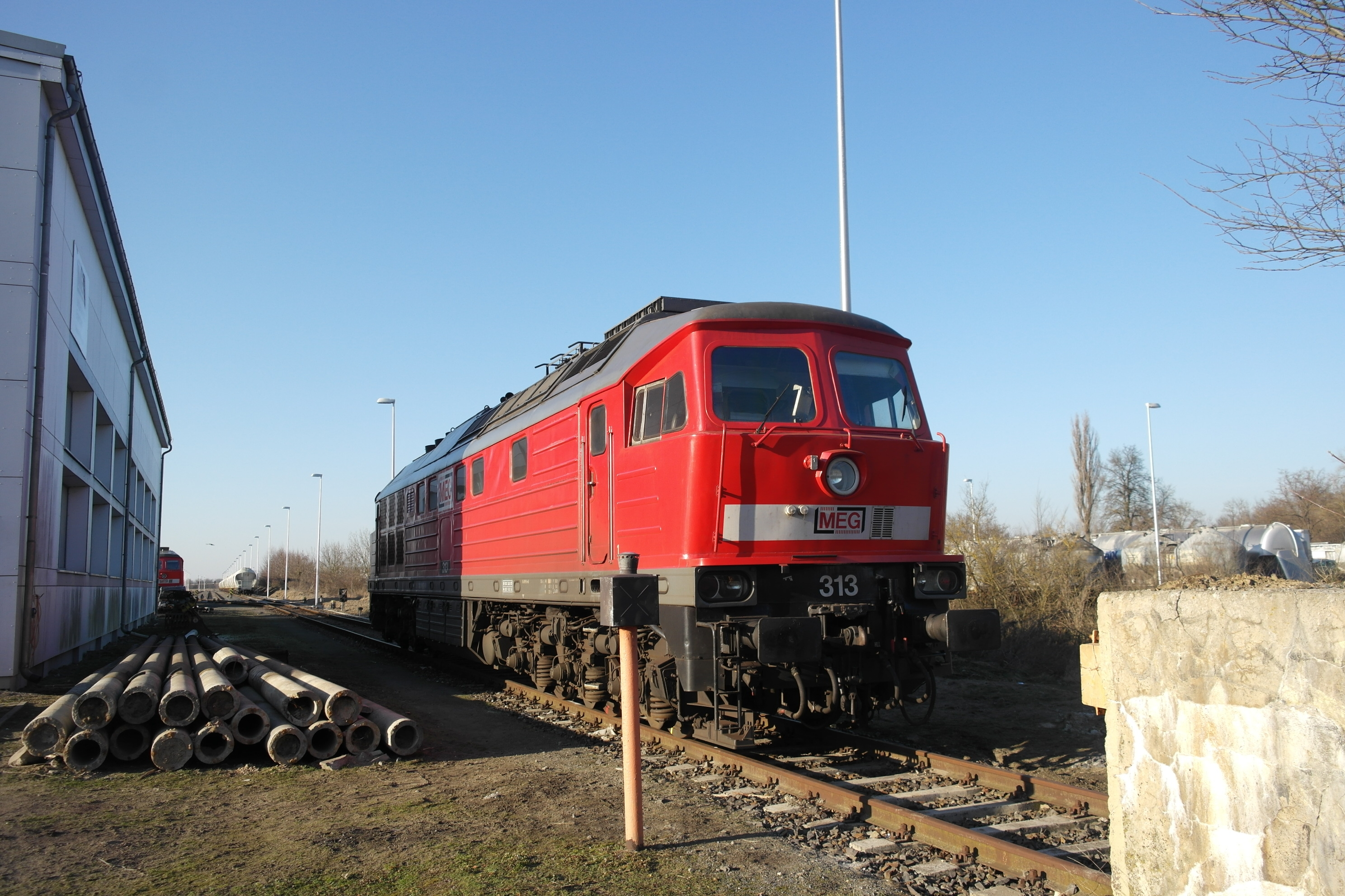 Lokomotive der MEG im Bahnhof Rüdersdorf b Berlin